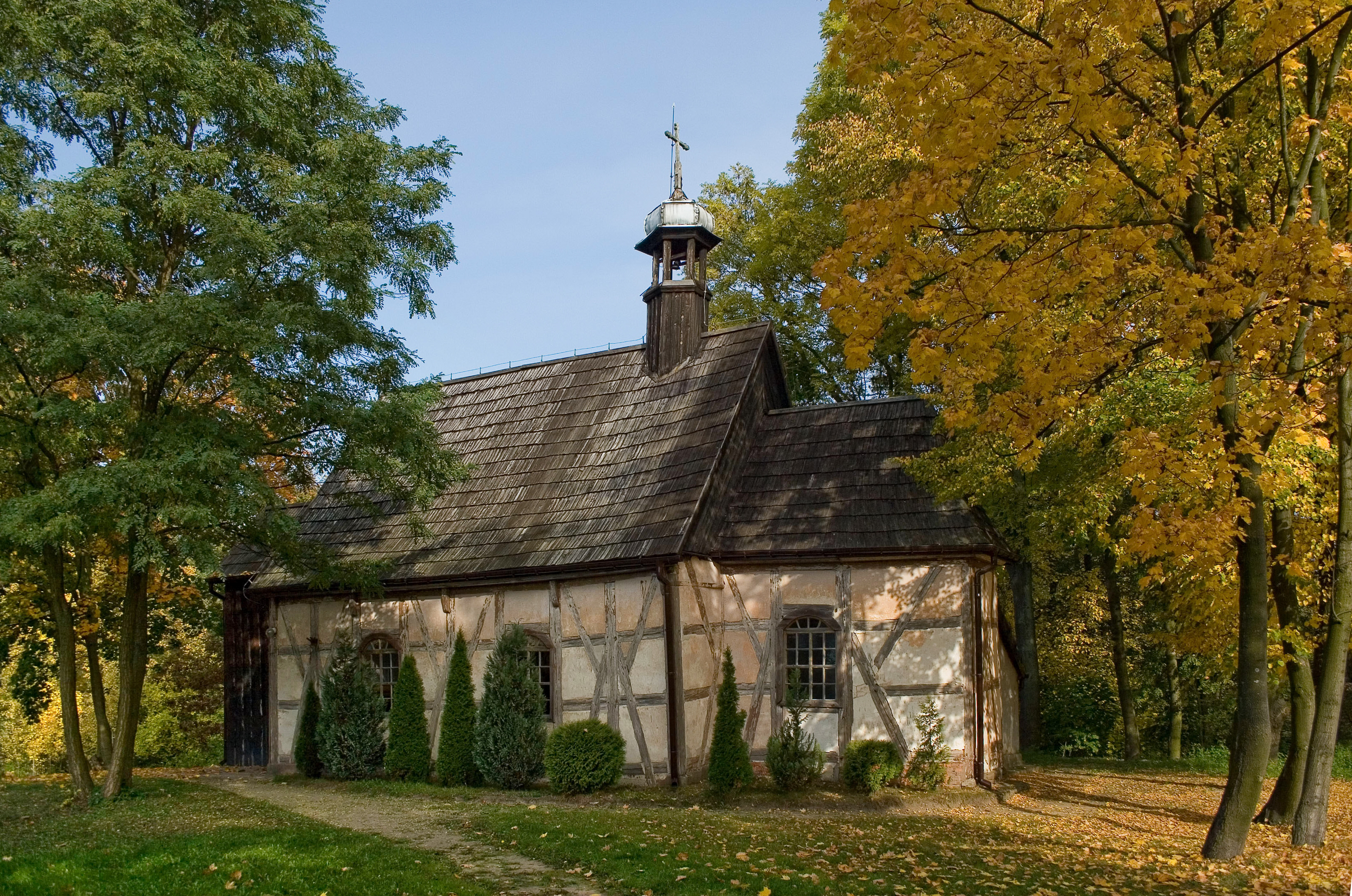 Kościółek w miejscowości Olszyna (zabytek, nr rejestr. 527)